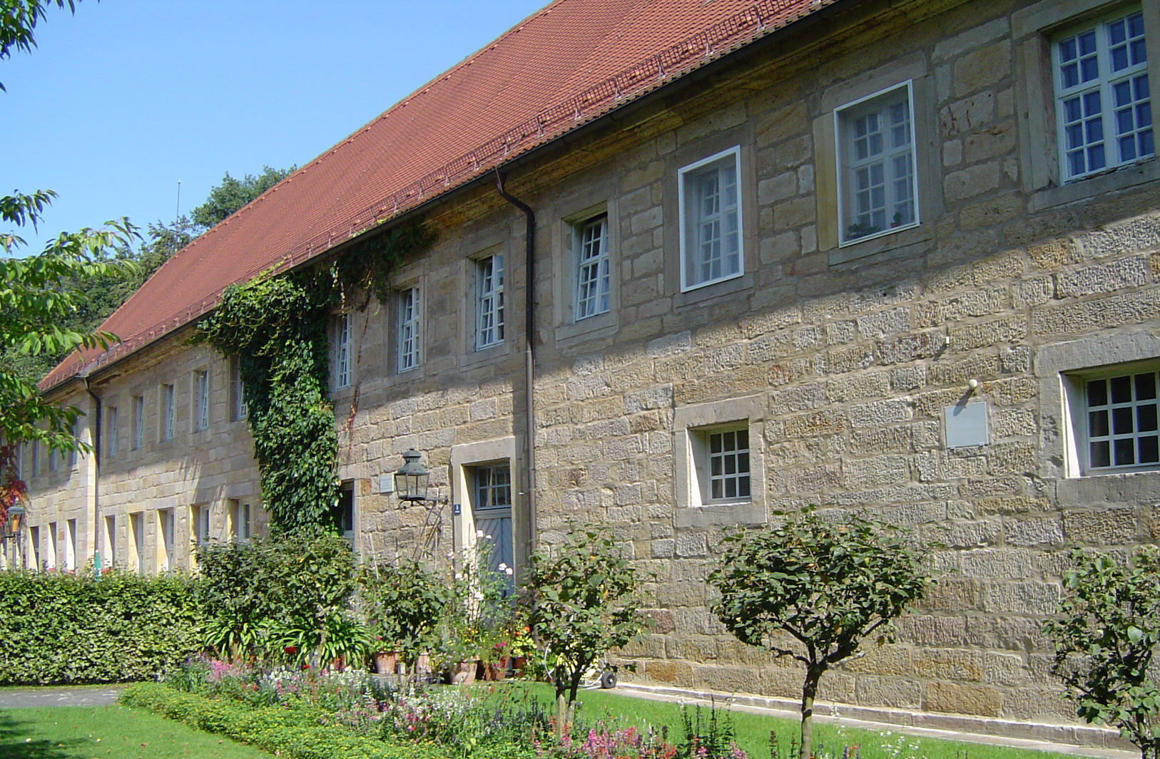 Bayreuth, Eremitage, ehem. Marstall (jetzt Wirtschaftsgebäude), langgestreckter, zweigeschossiger Sandsteinquaderbau mit Eckrisaliten und Walmdach, 1. Hälfte 18. Jh.